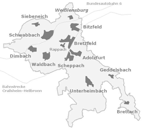 Übersicht der Ortsteile von Bretzfeld